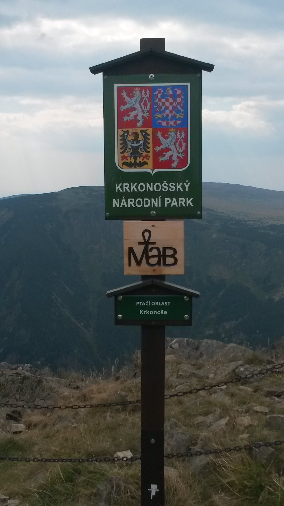 Značka KRNAPu